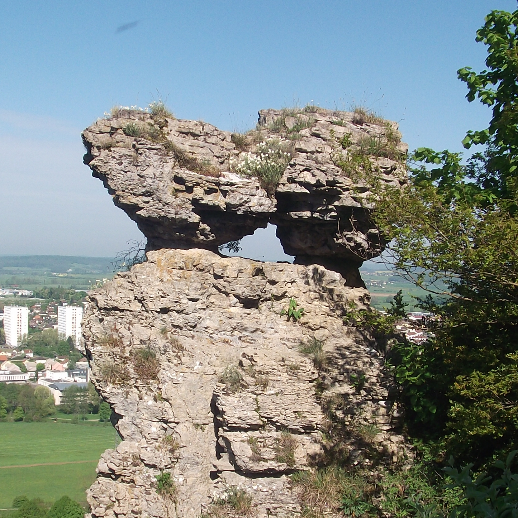 Le sabot de Frotey-lès-Vesoul (Haute-Saône, Franche-Comté)